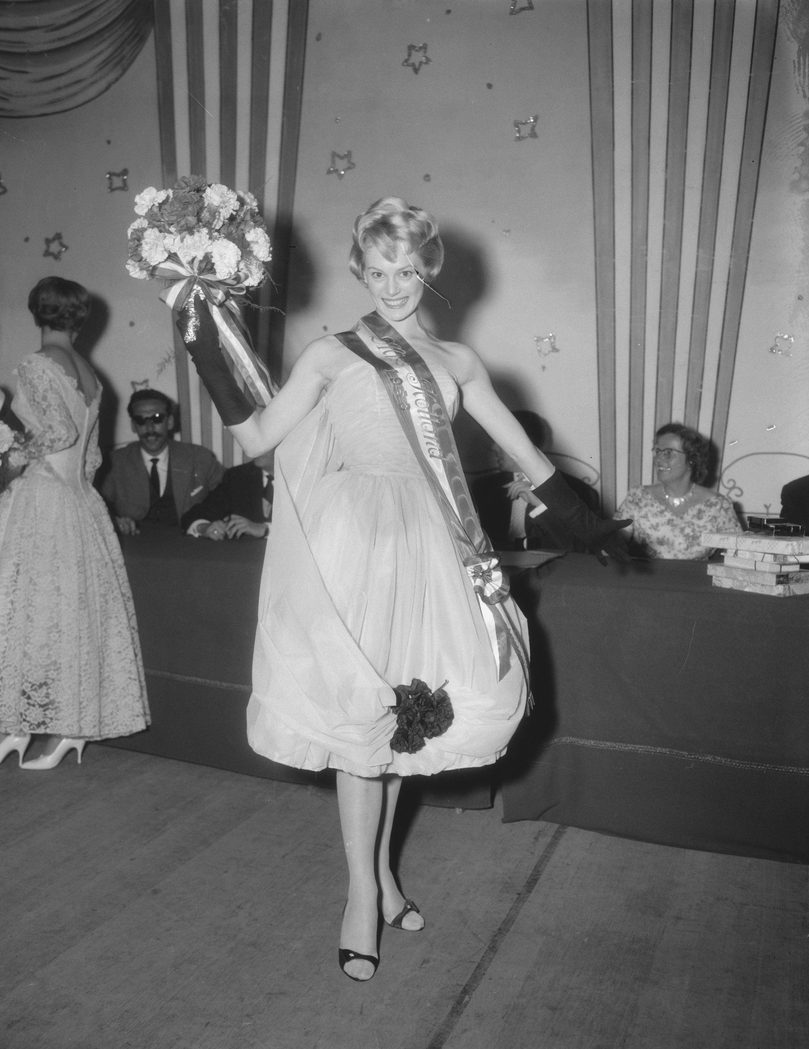 Collectie / Archief : Fotocollectie Anefo Reportage / Serie : Miss Holland 1958 Beschrijving : Verkiezing van Miss Holland 1958 in Krasnapolsky; de winnares Lucienne Struve, 19 jaar Datum : 5 mei 1958 Locatie : Amsterdam, Noord-Holland Trefwoorden : missverkiezingen, vrouwen Persoonsnaam : Struve, Lucienne Instellingsnaam : Miss Holland Fotograaf : Pot, Harry / Anefo Auteursrechthebbende : Nationaal Archief Materiaalsoort : Negatief (zwart/wit) Nummer archiefinventaris : bekijk toegang 2.24.01.04 Bestanddeelnummer : 909-5387